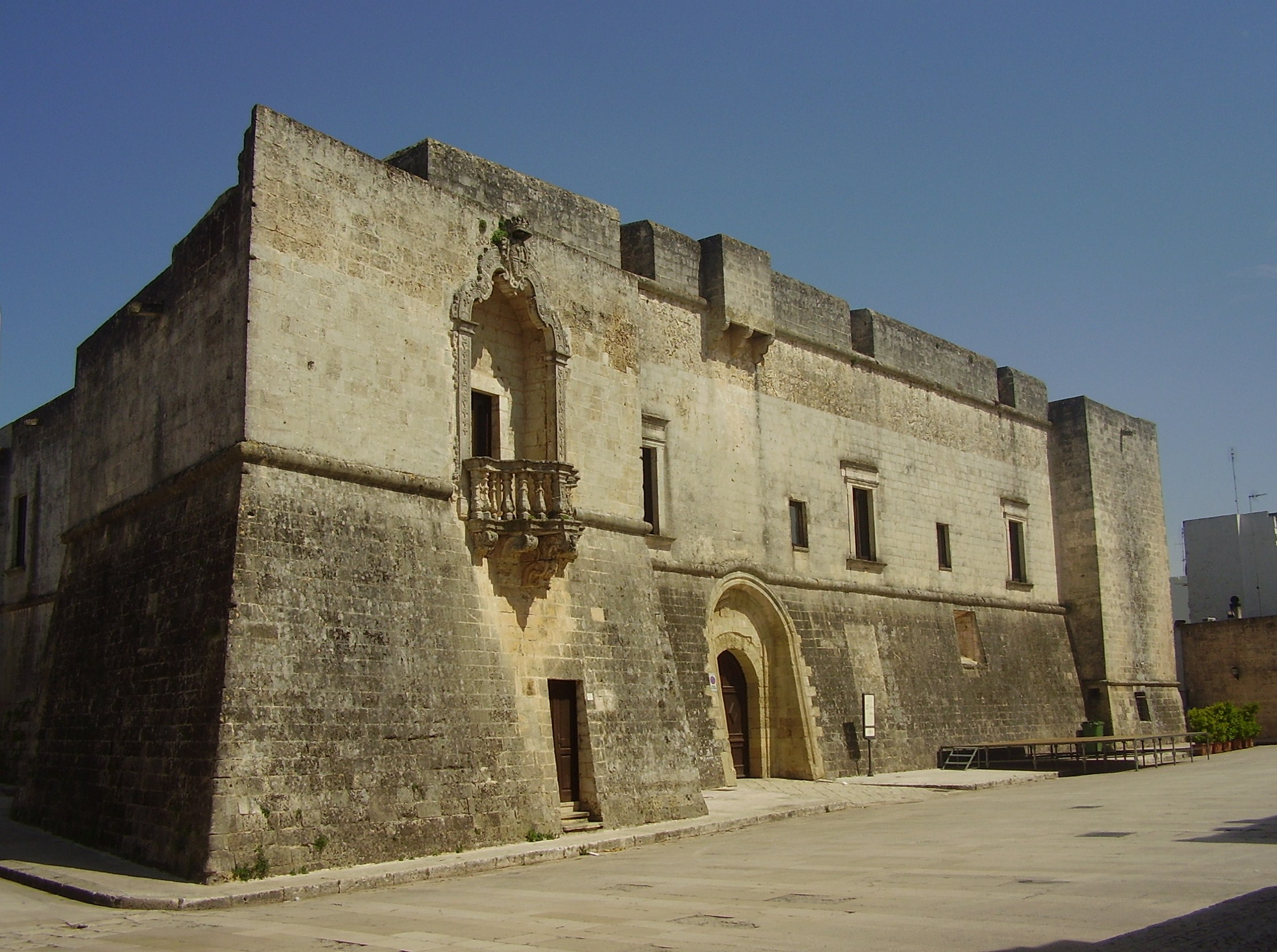 Castello saraceno di Andrano, Lecce